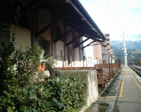 Altra veduta di Pontassieve